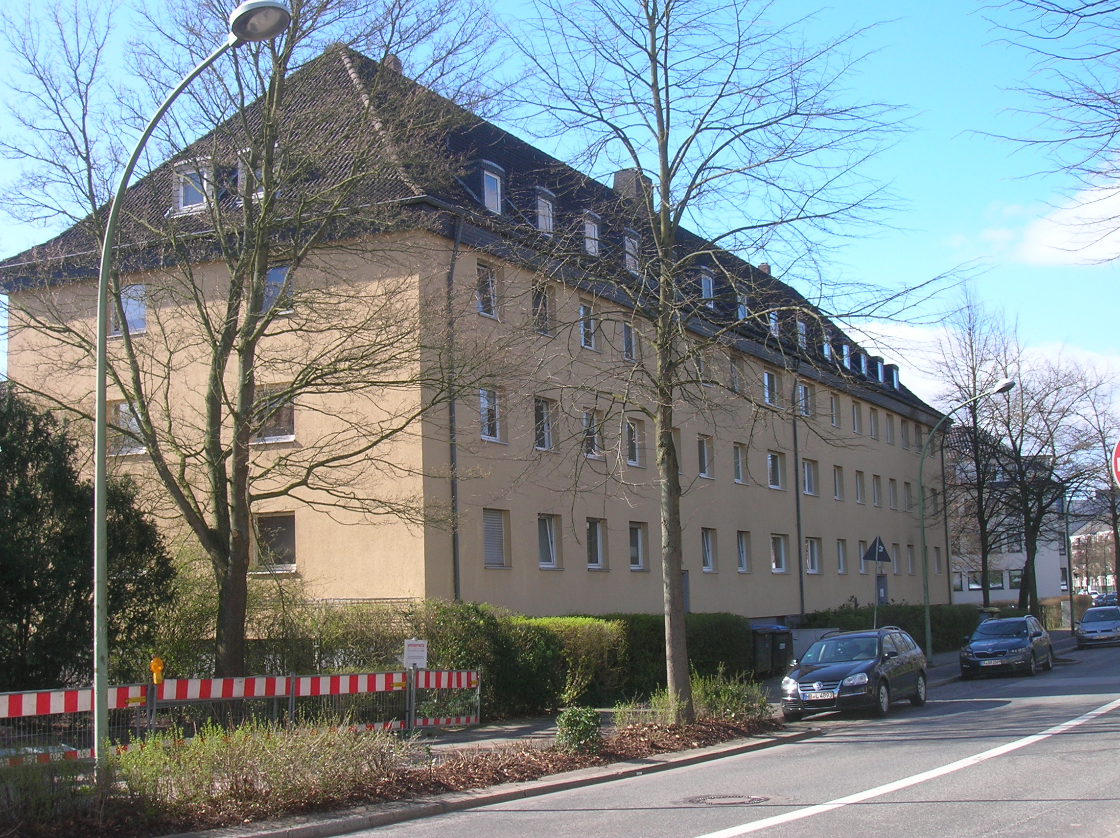 Ehemaliger Wohnblock für US-amerikanische Soldaten am nordöstlichen Bogen der Friedrich-Ebert-Straße in Bremerhaven